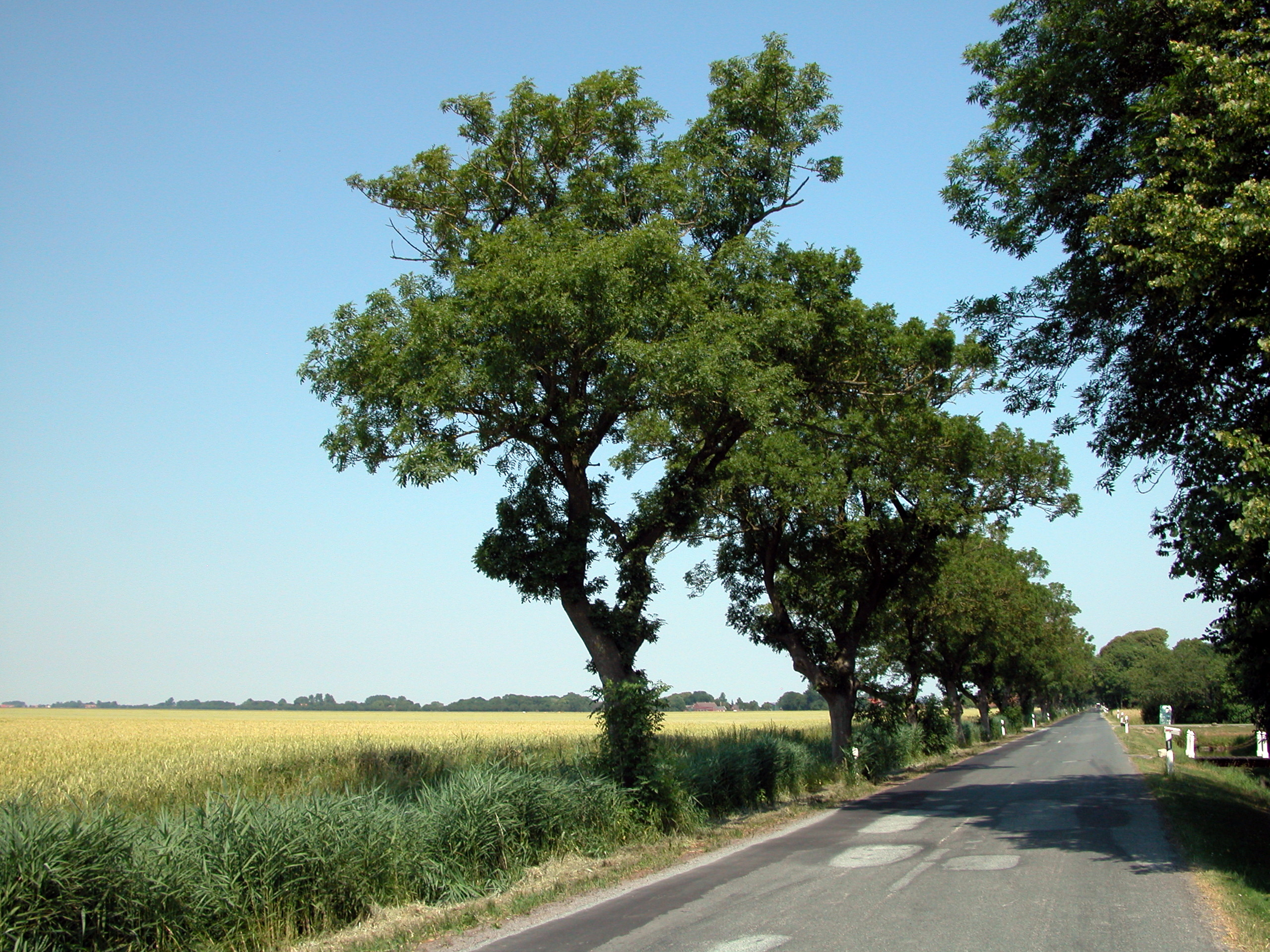 Landschaftspolder: Einzige Straße und Felder (von Westsüdwest gesehen).